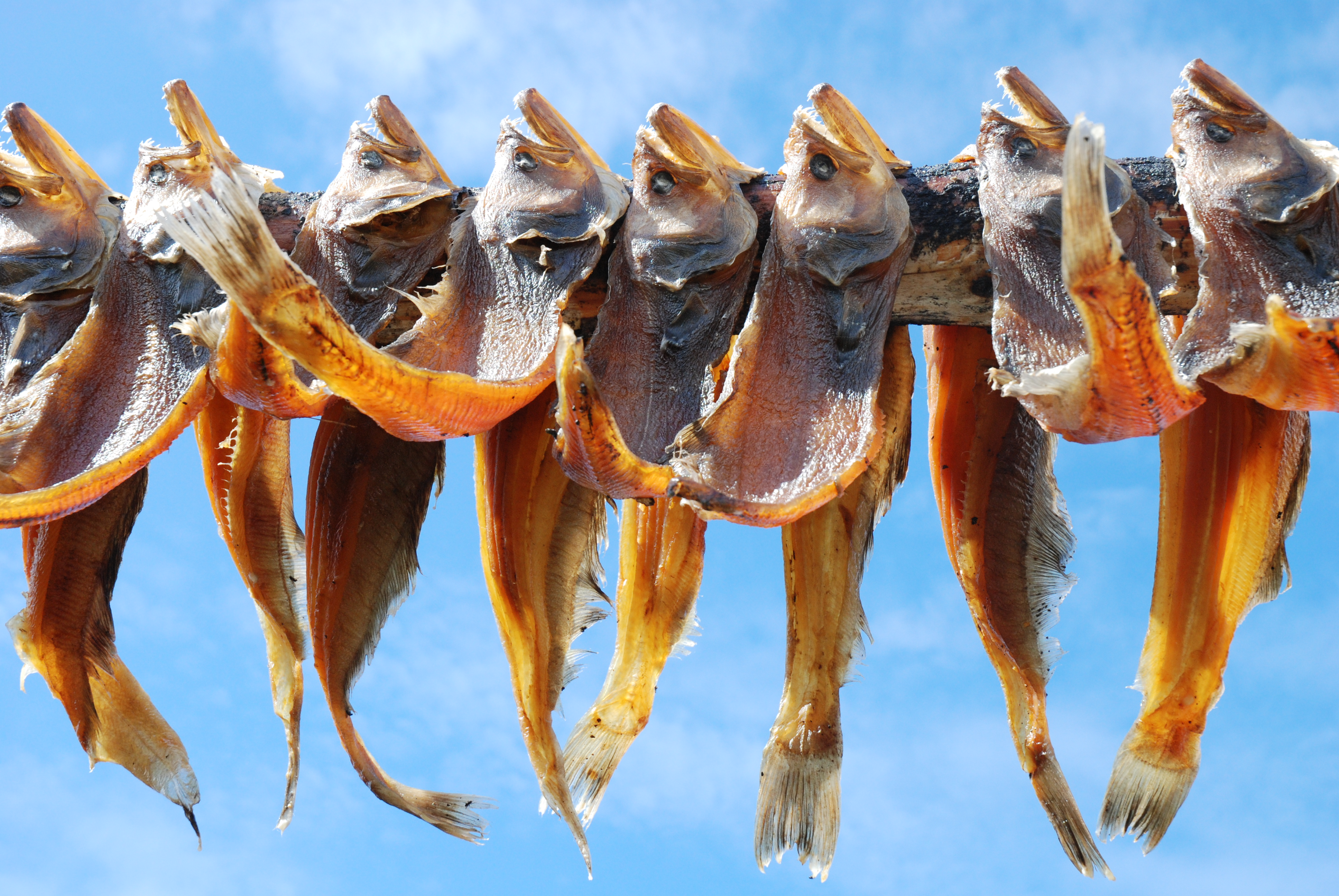 Oqaatsut, Grønland Keywords: Animals, Fisheries, Food, Greenland